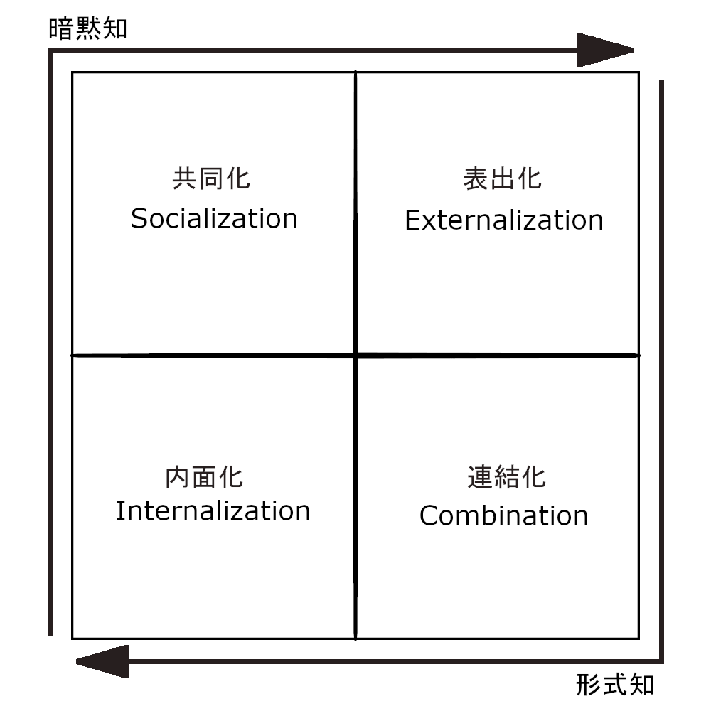 SECIモデルの日本語版。